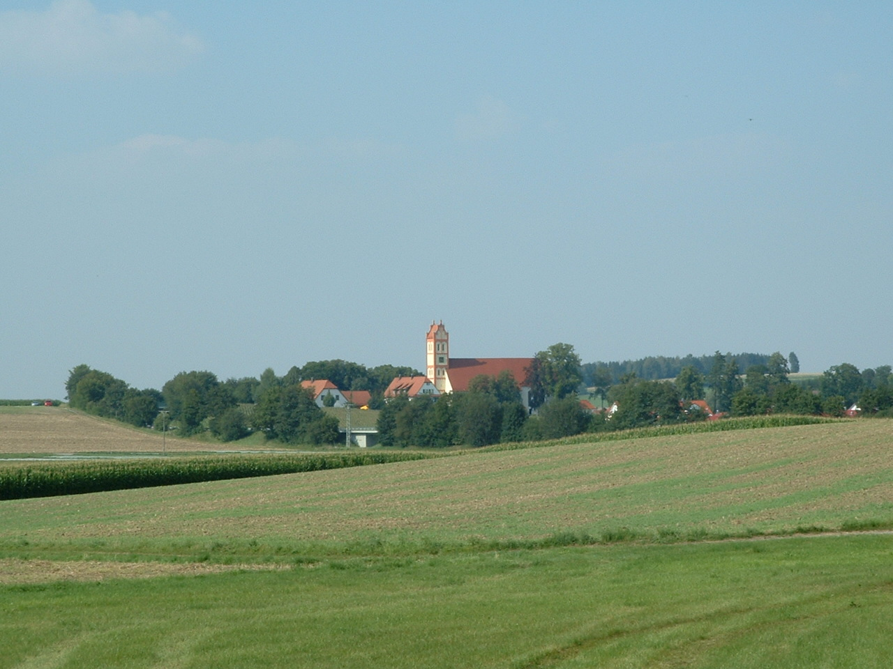 Schemmerhofen